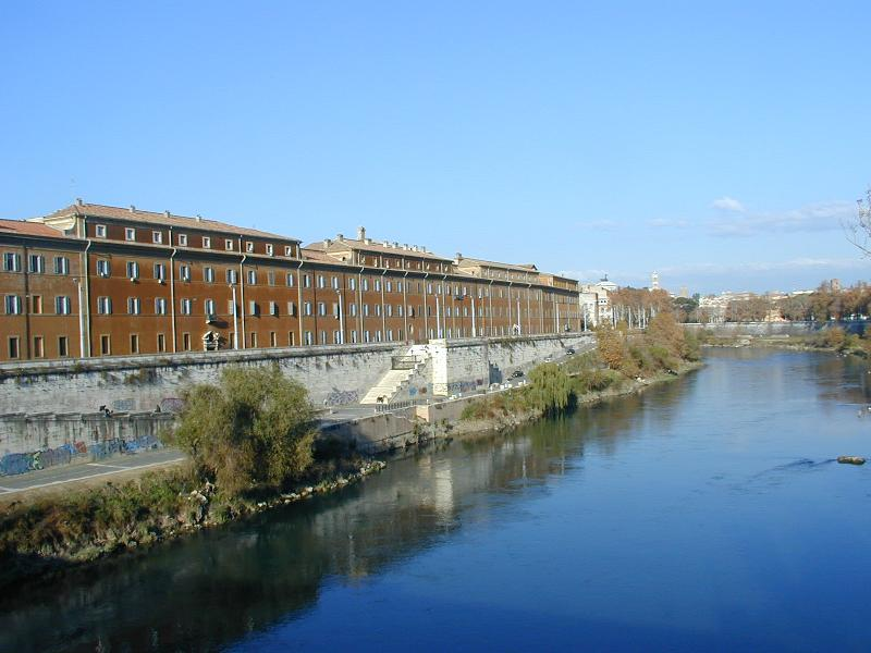 Roma, Trastevere: Istituto san Michele fronte Tevere (già Porto di Ripa Grande)